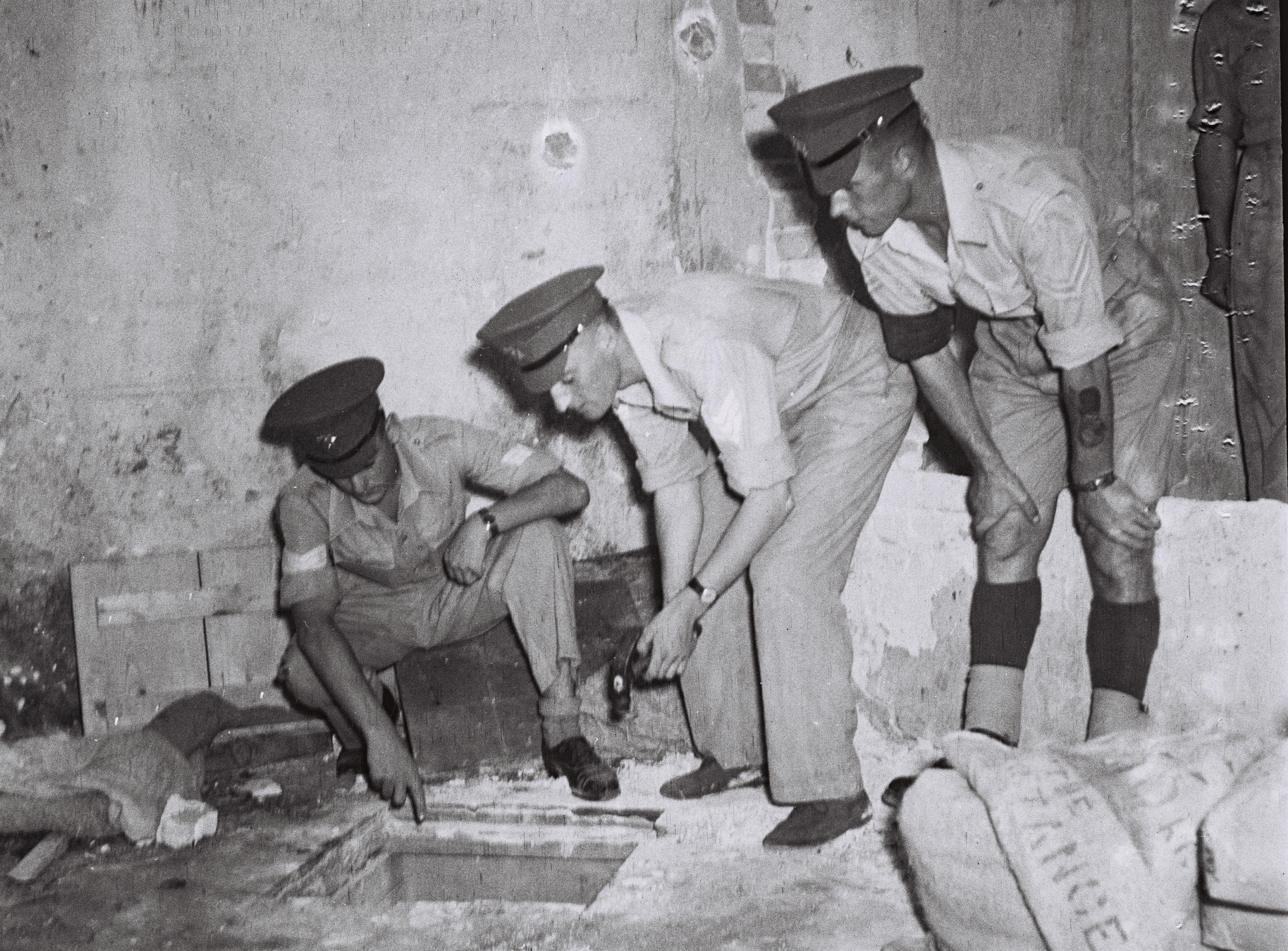 יוני 1947, חיילים בריטים מחפשים נשק בלתי חוקי במרתף בית הדר בתל אביב